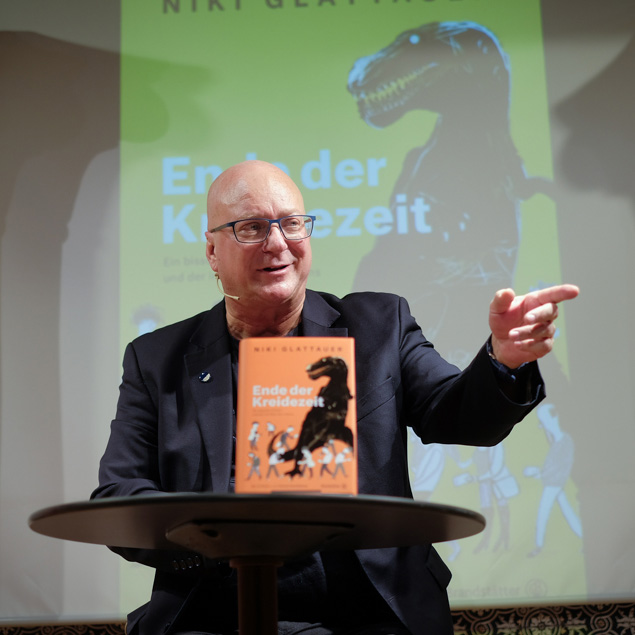 Nikolaus Glattauer bei der Präsentation seines Buches Ende der Kreidezeit